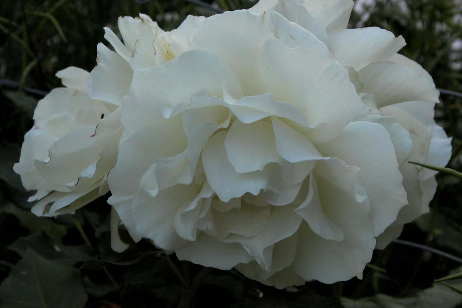 Rosa 'Edelweiss'